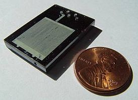 a microreactor.